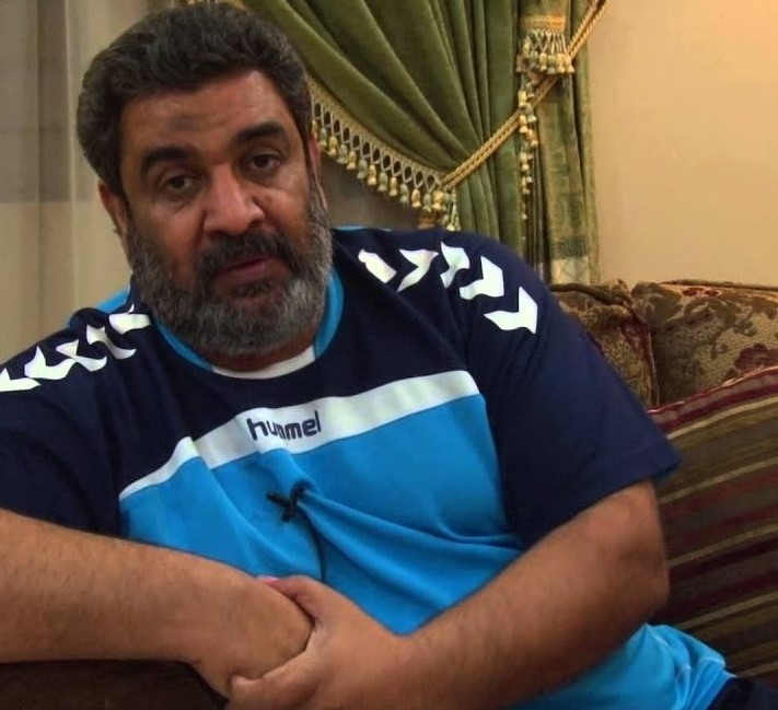 الكابتن عباس السبع